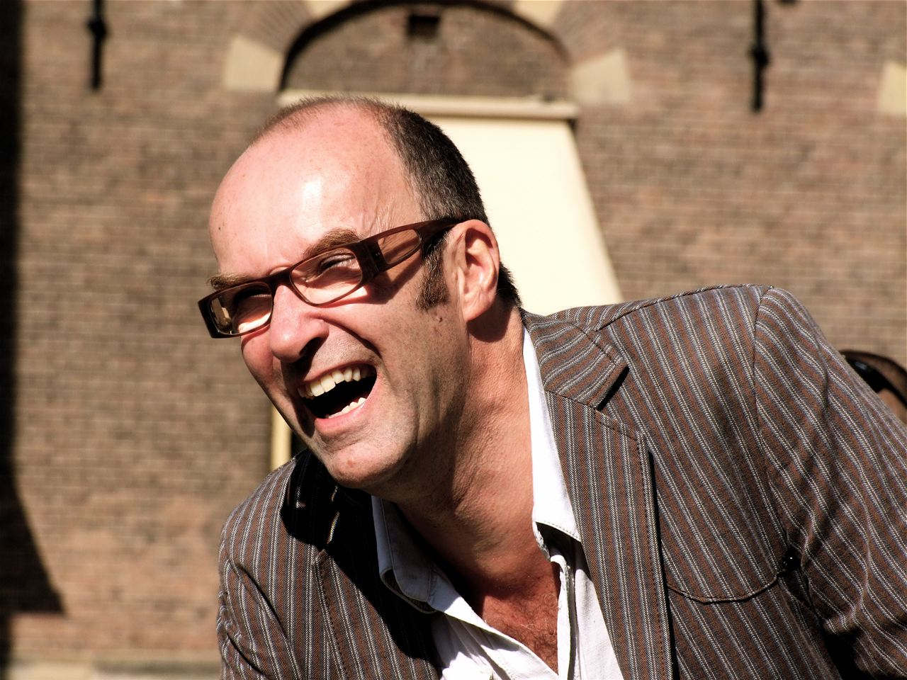 De Nachtburgemeester van Den Haag René Bom organiseert een fietstocht door Den Haag een van de deelnemers aan deze tocht was Bart Chabot. Foto gemaakt op het Binnenhof.